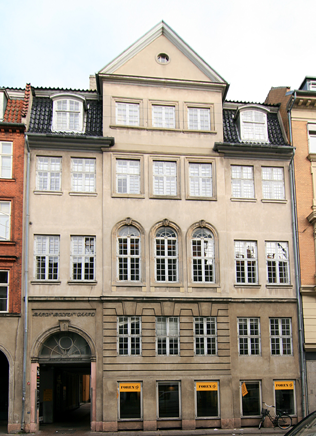 Baron Boltens Gård, Gothersgade 8A, København. Bygget 1771. Fredet.